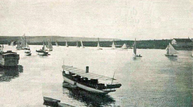 Bassin des courses de yachts, lors des JO de 1900.